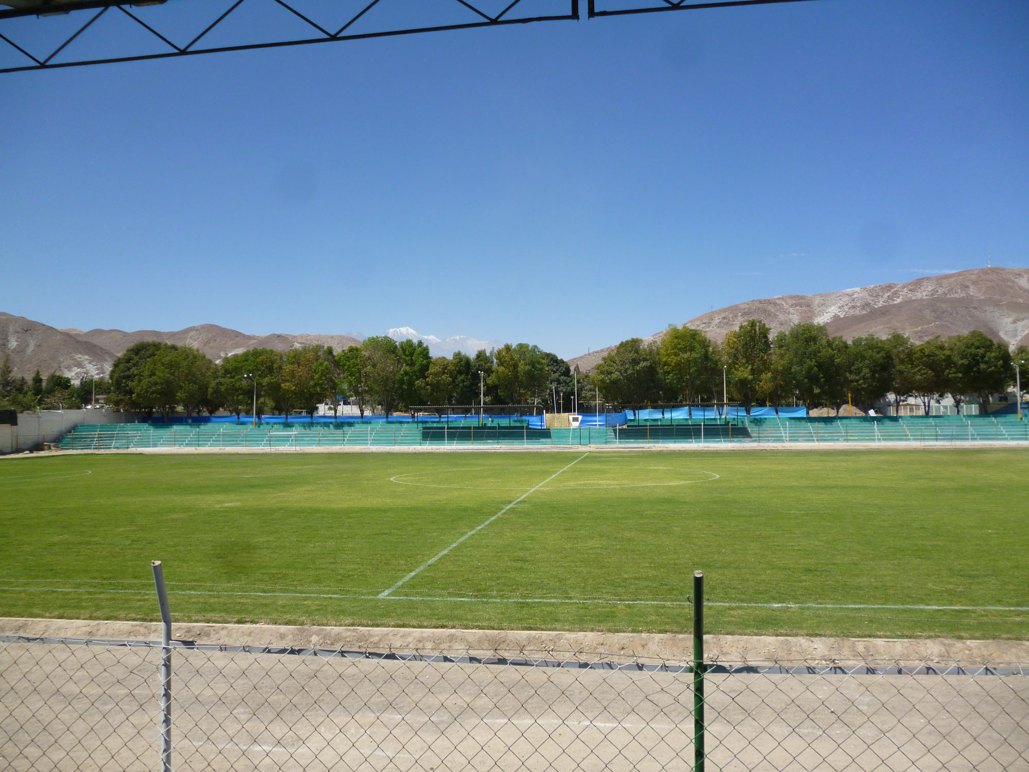 Foto tomada del Interior del estadio Municipal del distrito de La Joya